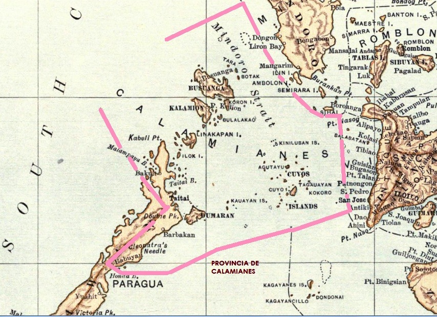 Provincia Filipina de Calamianes, año 1899